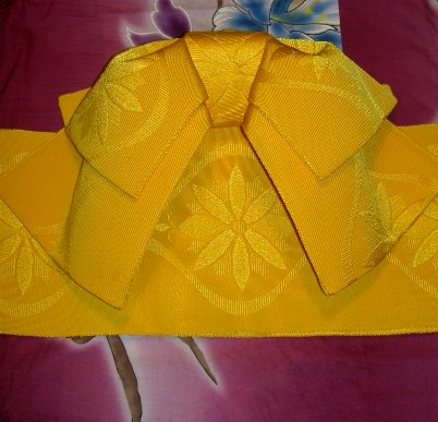 Obi on yukata